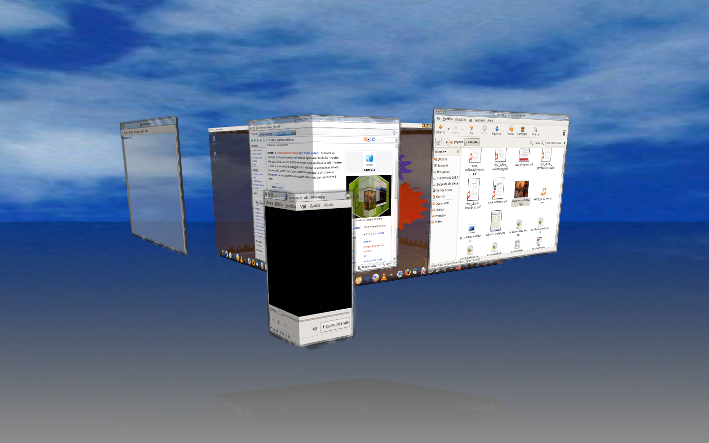 Compiz Fusion